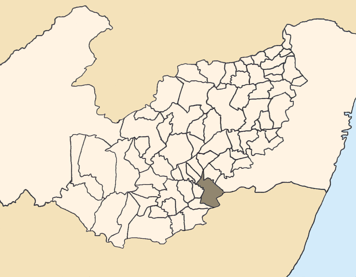 Mapa da mesorregião Agreste de Pernambuco (Brasil) subdivida em municípios. Em destaque, o município de Canhotinho. Map of the brazilian state of Pernambuco (mesorregião Agreste) showing the city of Canhotinho. Imagem tratada com o GIMP. Image made with GIMP.